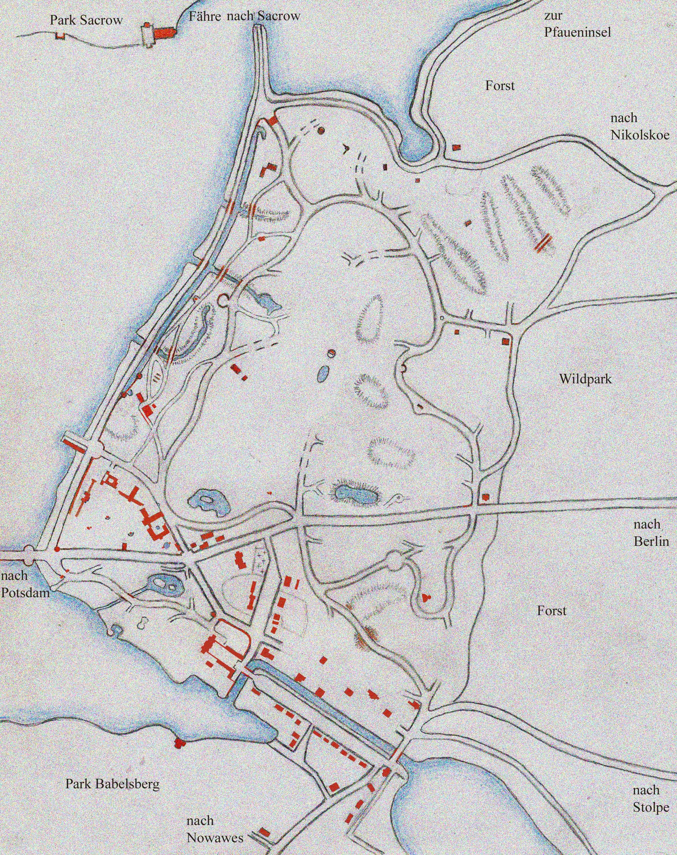 Park Klein-Glienicke, Skizze des Drives und seiner Wegenetzanschlüsse